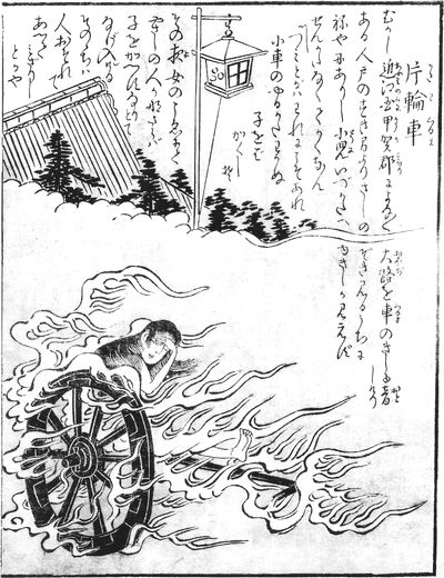 Katawa-guruma (片輪車, a woman riding on a flaming wheel) from the Konjaku Gazu Zoku Hyakki (今昔画図続百鬼)